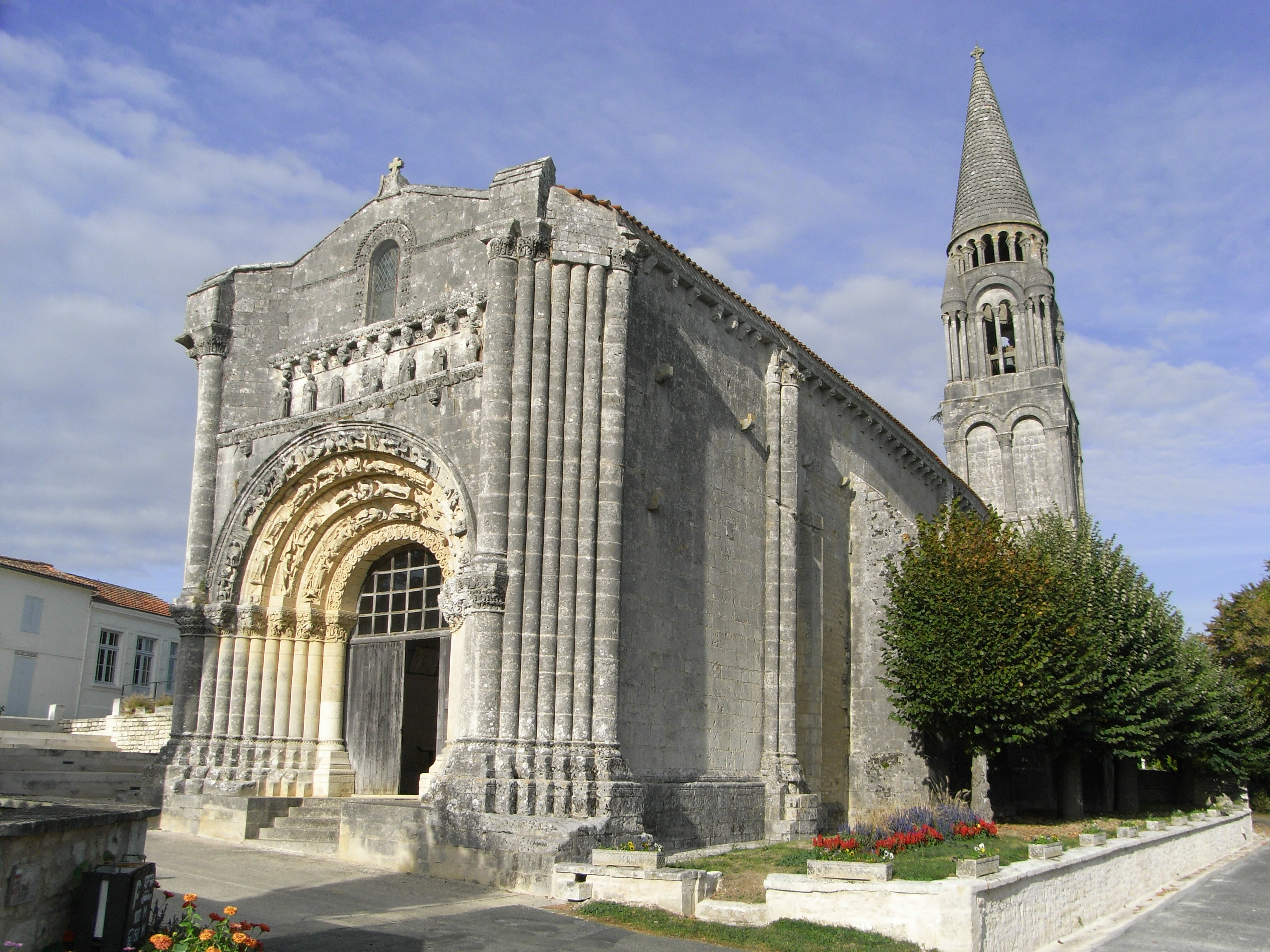 Église du IXème siècle à Fenioux en Charente-Maritime (France). Elle classée monument historique depuis 1840.